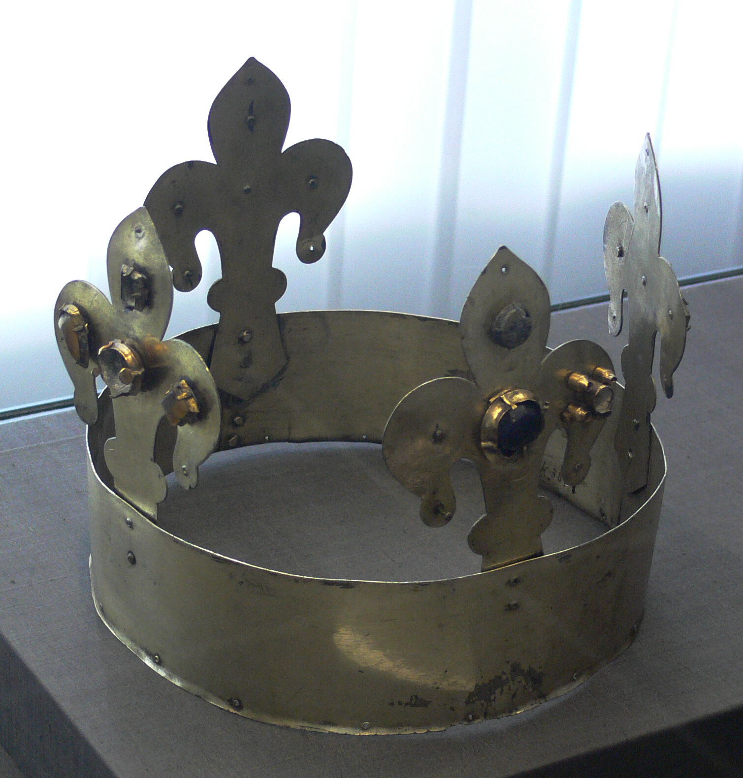 Grabkrone der Königin Anna († 1281) aus dem Münsterschatz in Basel; Silber, vergoldet; Wien, 1281 Kunstgewerbemuseum Berlin, Inv.-Nr. K3874